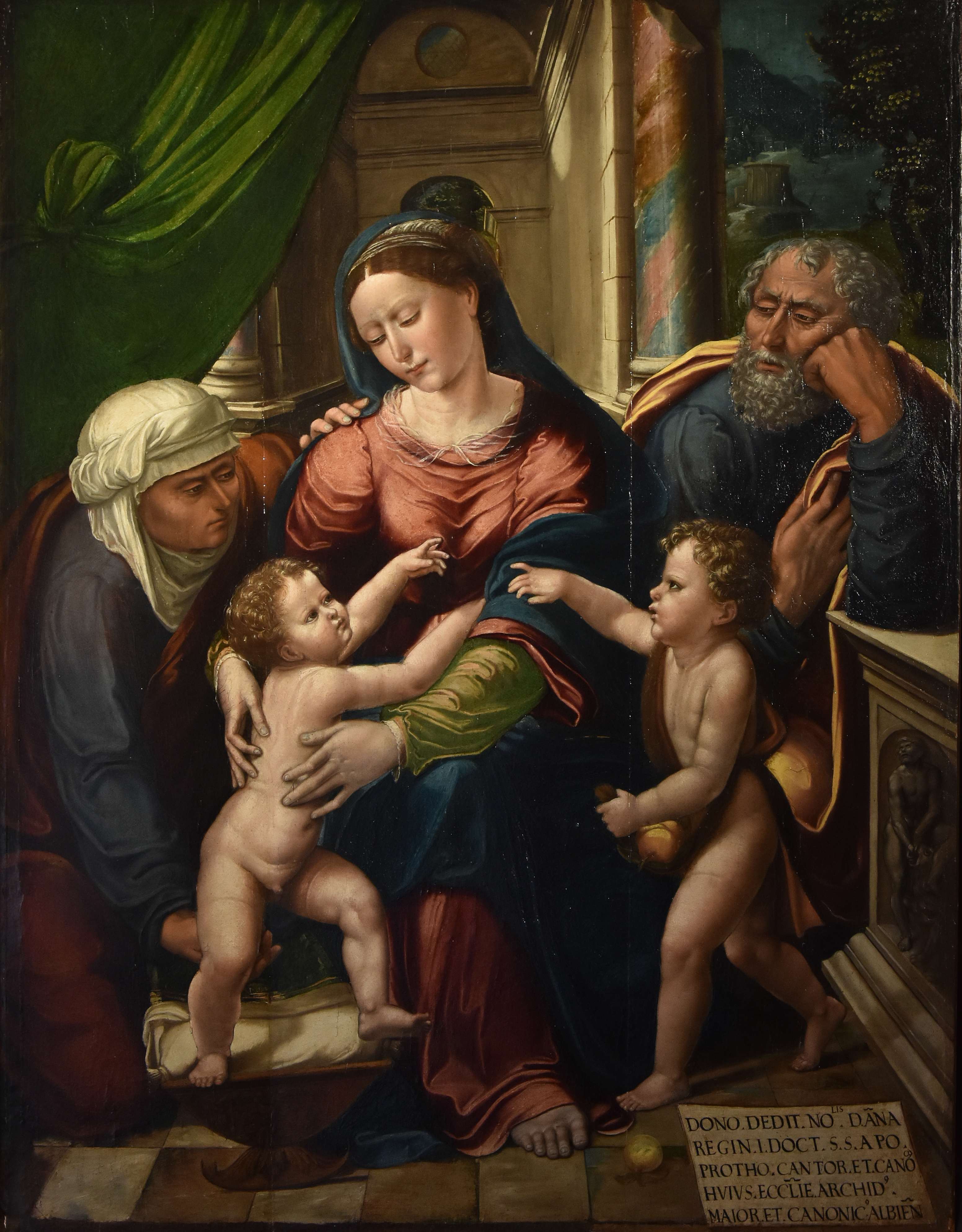 Karsten van Limbos (actief 1527-1542) De heilige Familie - Kathedraal van Albi 9-10-2019